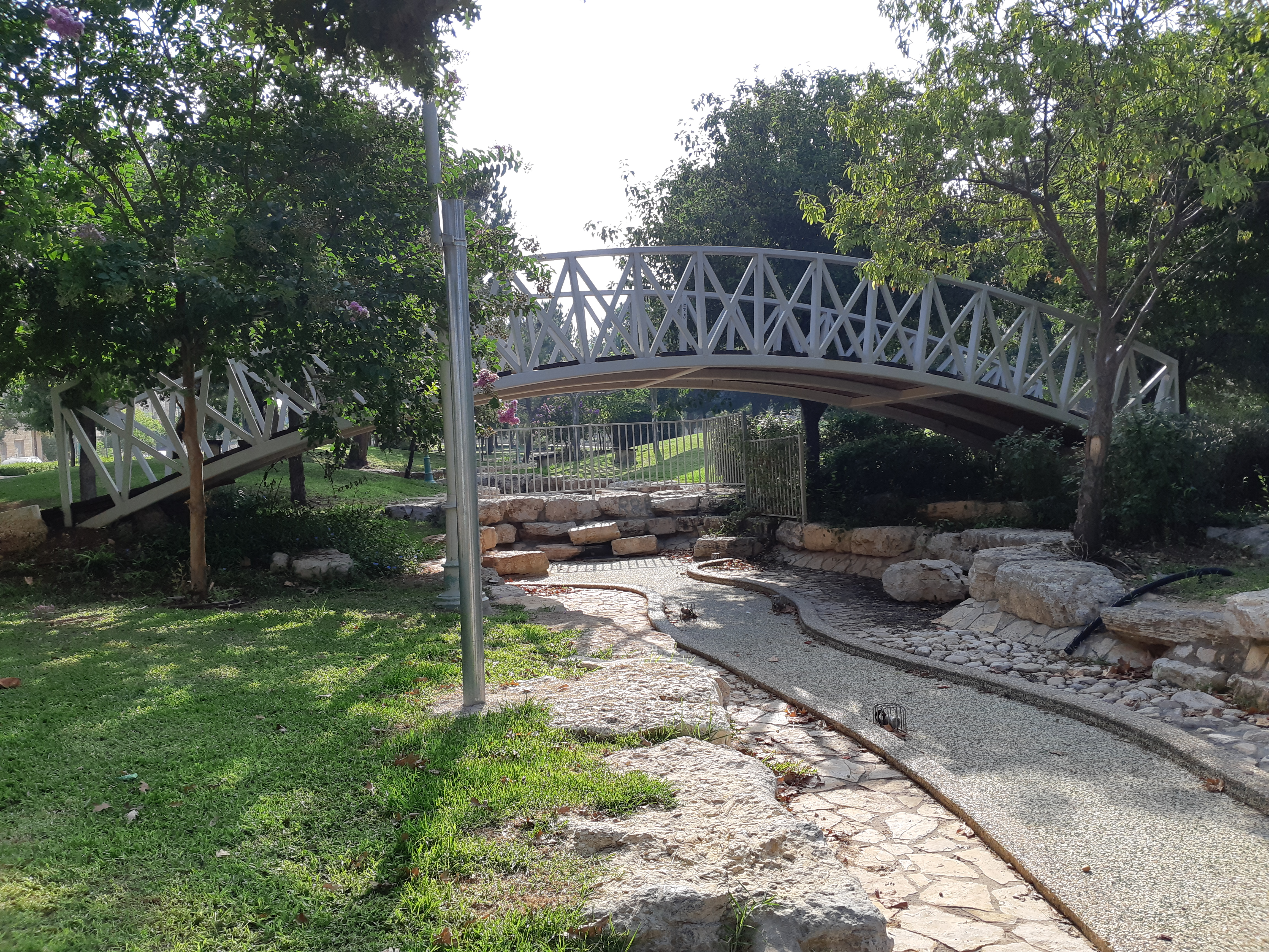 גשר בגן "הנחל הרטוב" בקצה המערבי של הרחוב עמק איילון